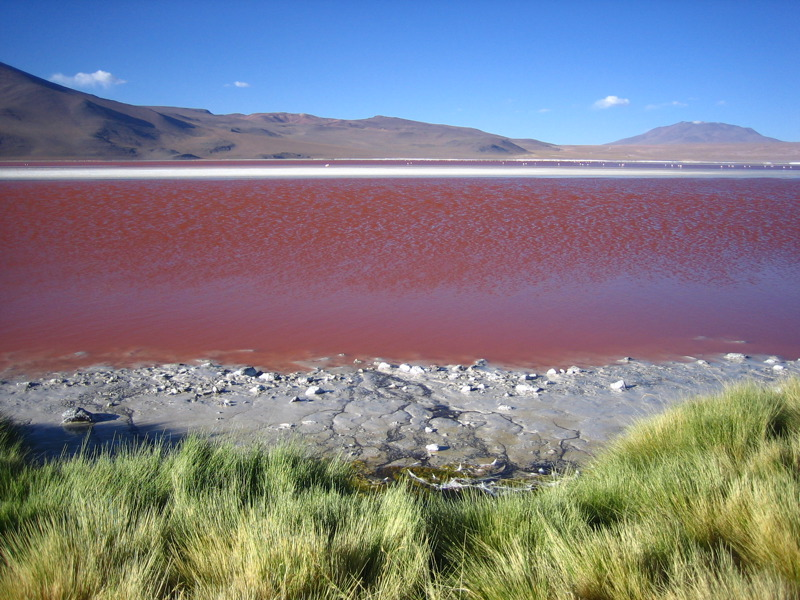 Vista de la Laguna Colorada en el departamento de Potosí, Bolivia.